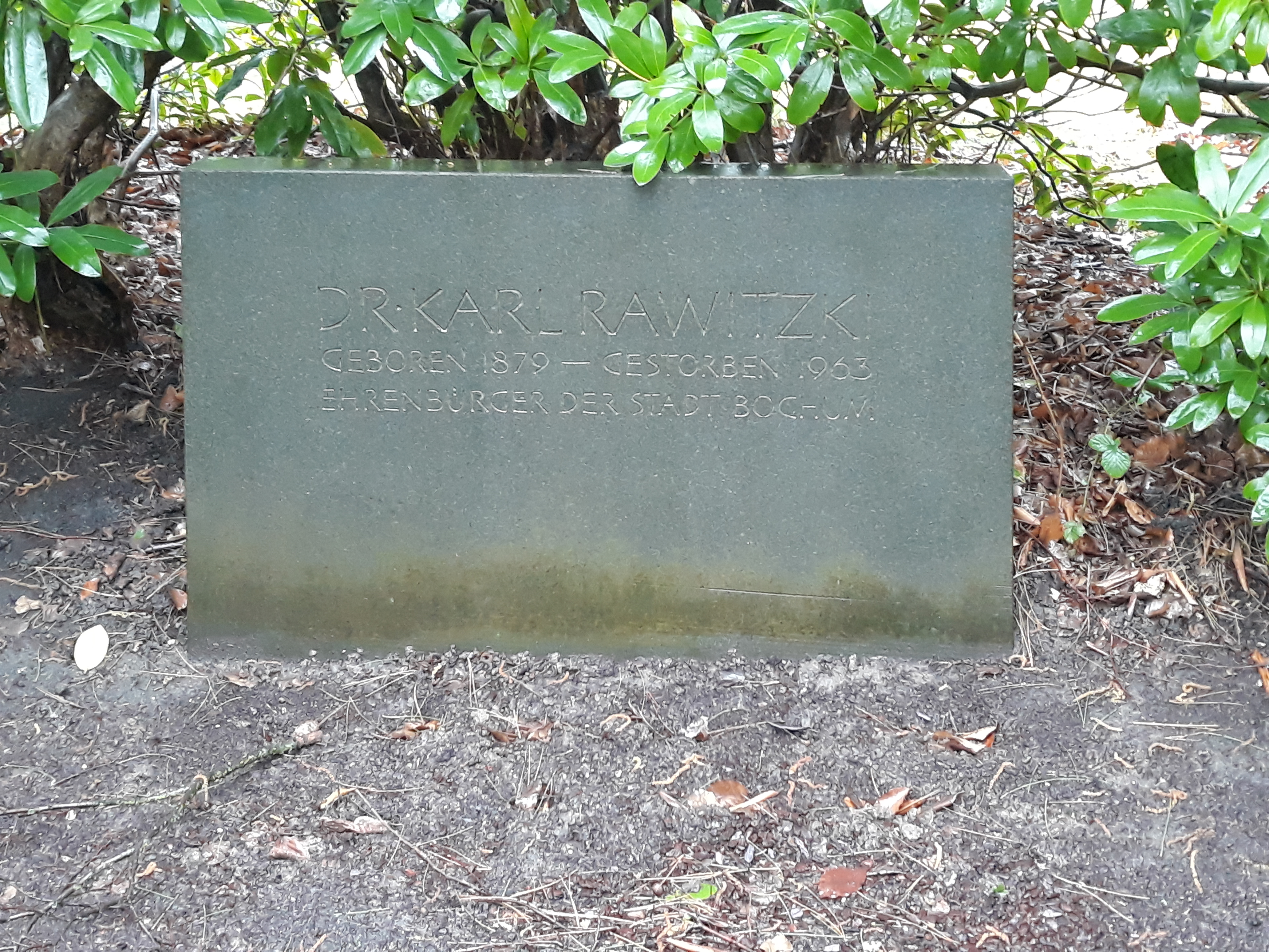 Das Grab des deutschen Politikers Carl Rawitzki auf dem Friedhof Blumenstraße in Bochum.